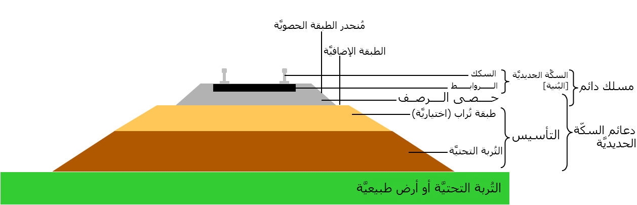 رسمٌ مقطعيٌّ يُظهرُ تشكيل وأُسس السكك الحديديَّة.